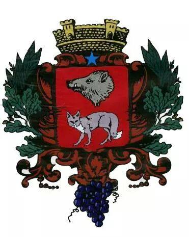 Blason de Gonfaron